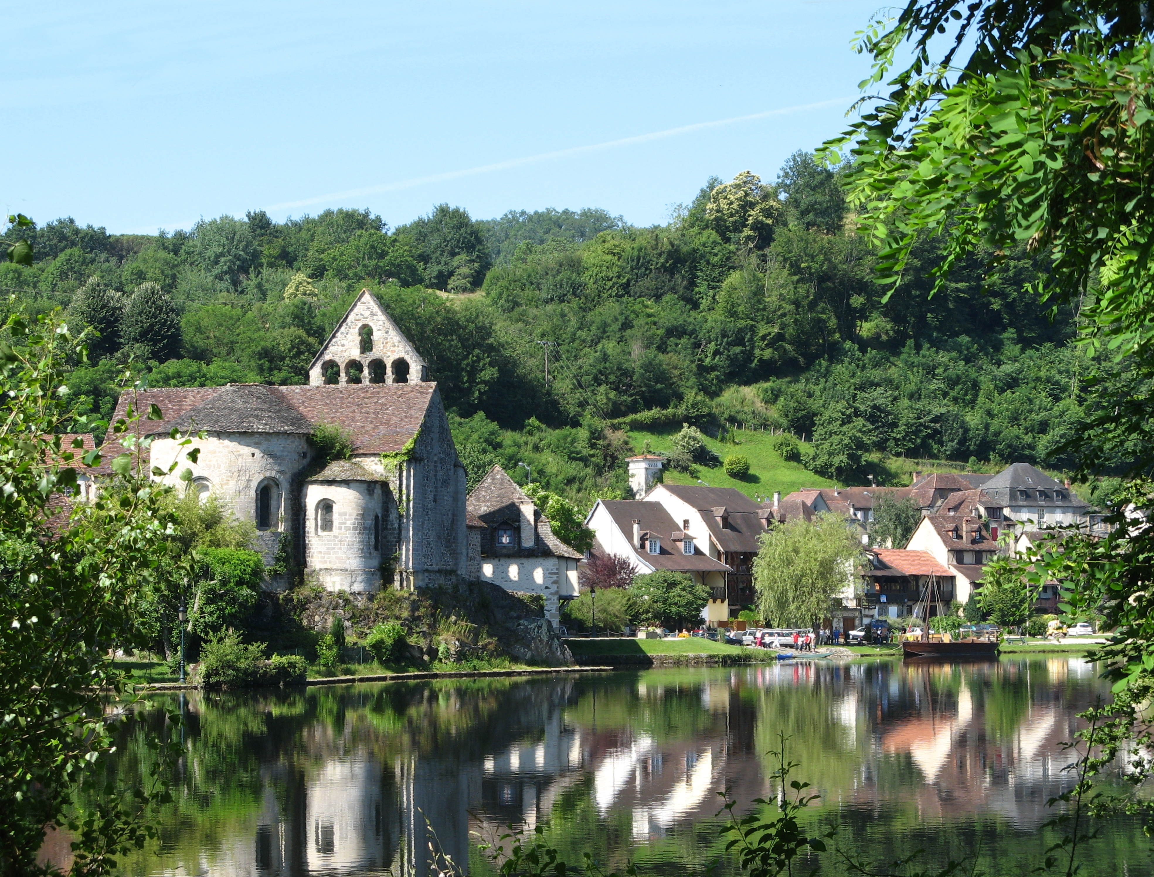 Beaulieu-sur-Dordogne, Corrèze, Limousin, Frankrijk - Chapelle des Pénitents of Église Notre-Dame (XIIe, XIVe en XVe eeuw).